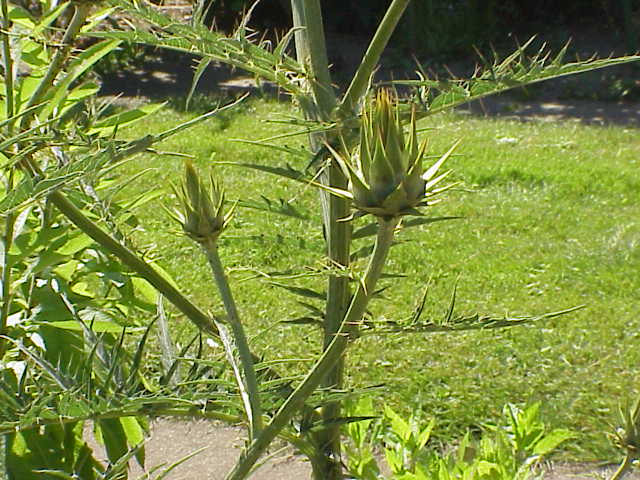 Species: Cynara cardunculus Family: Compositae Image No. 2